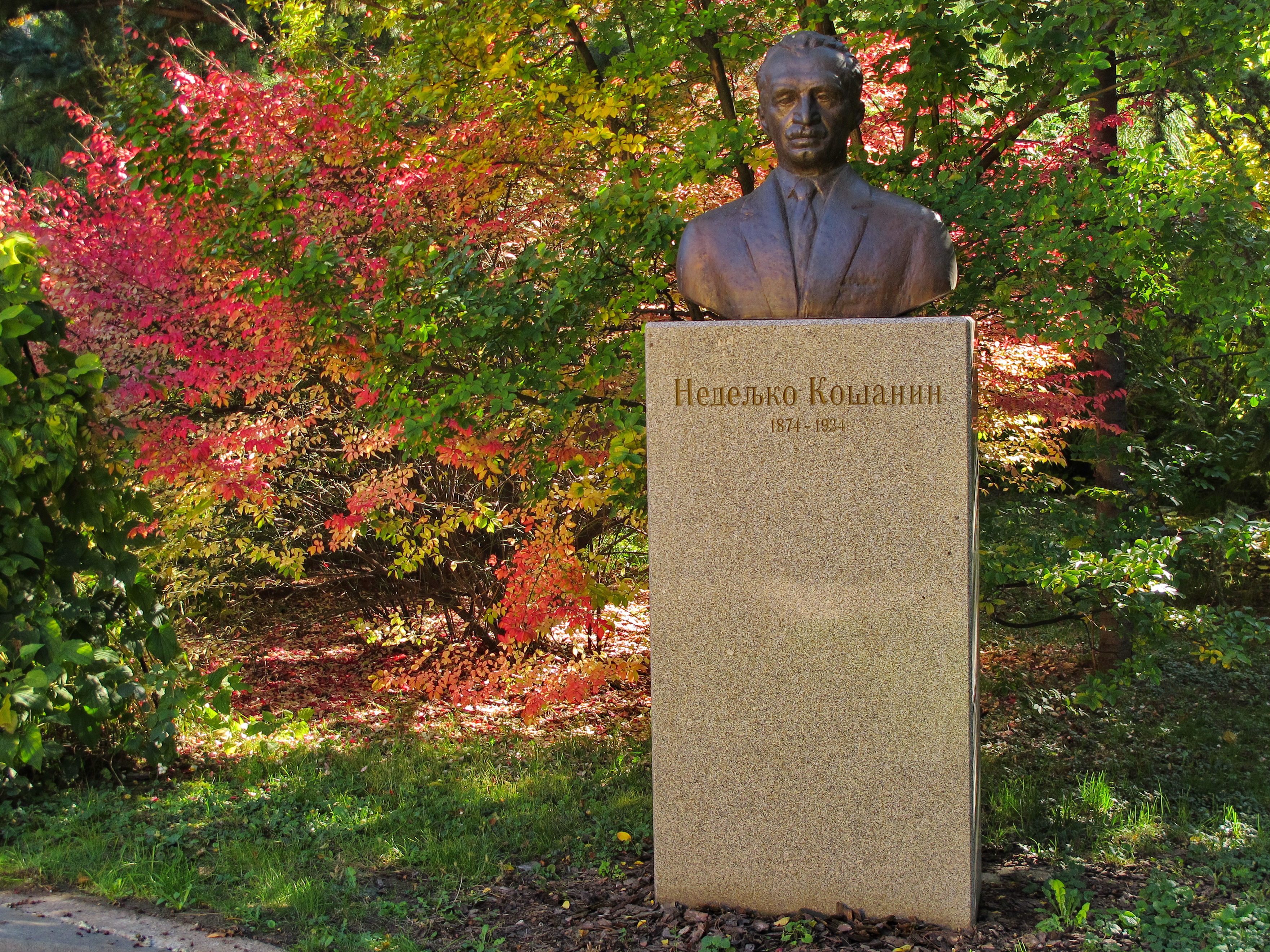 Ово је фотографија заштићеног природног добра у Србији под шифром: СП005This is a a photo of a natural area in Serbia with ID: СП005 Споменик природе Ботаничка башта Јевремовац